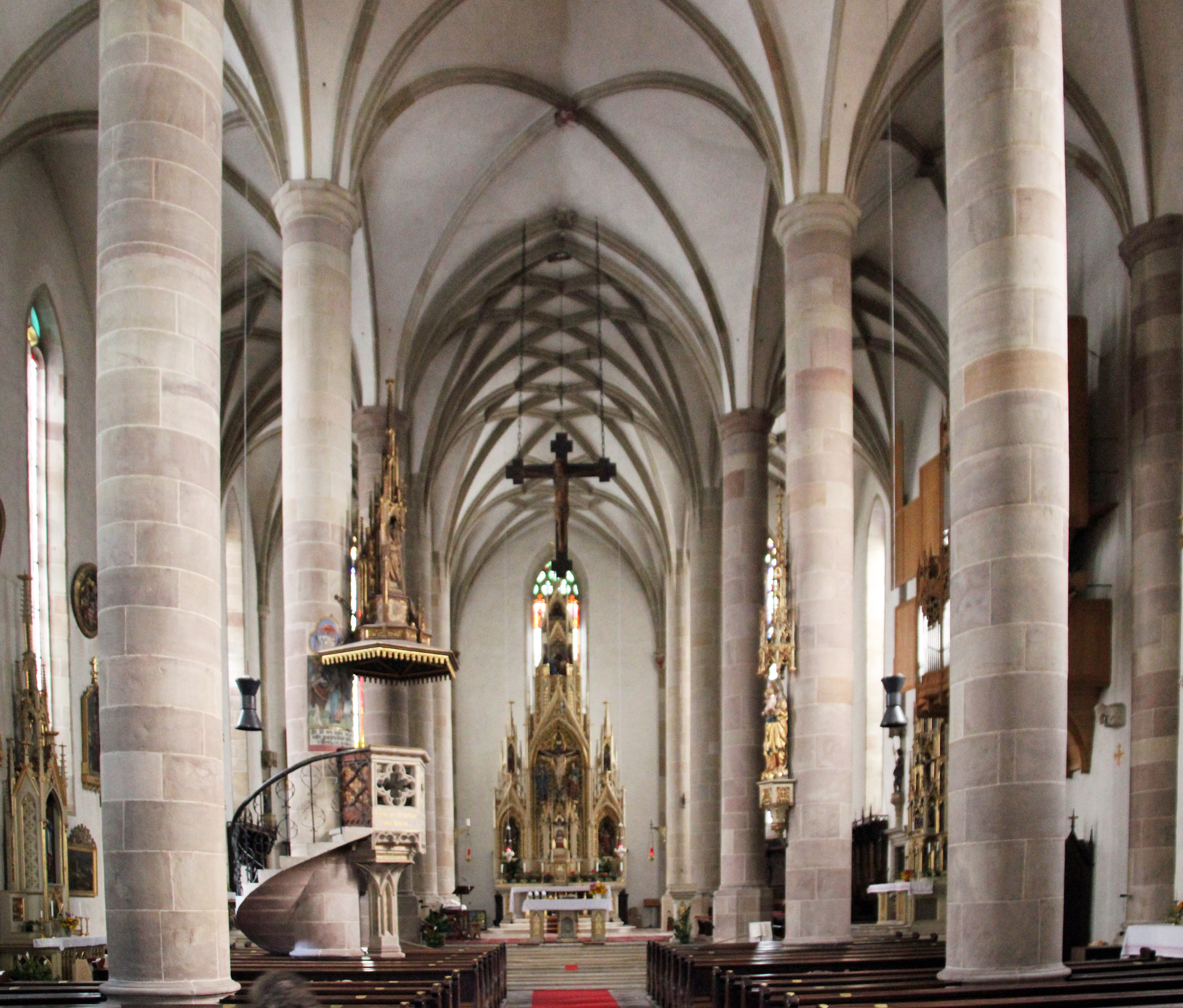 Pfarrkirche St. Pauls - Mittleres Kirchenschiff